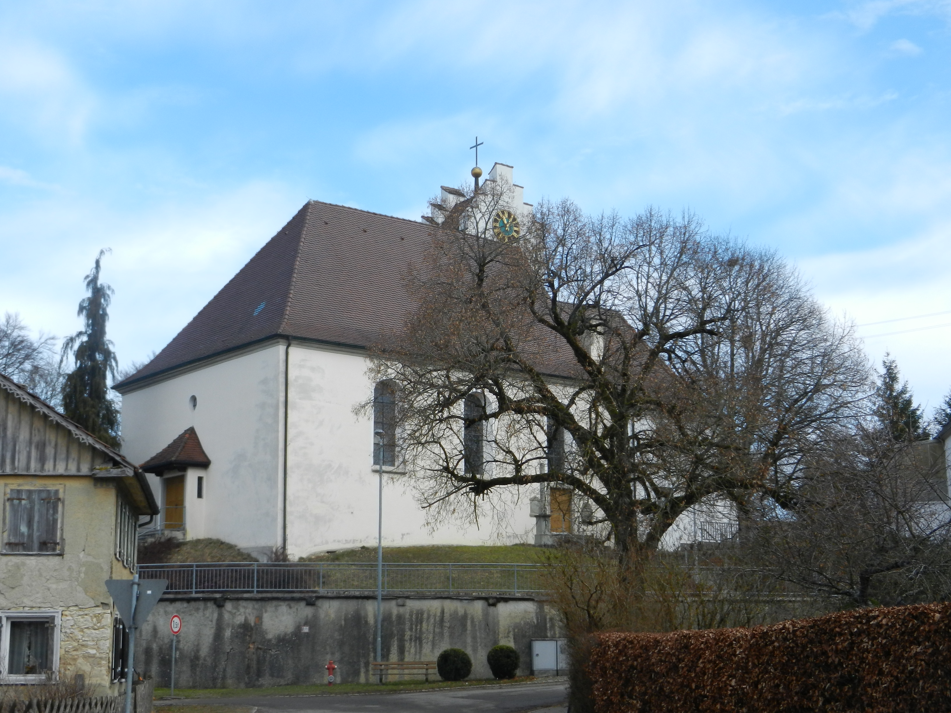 St. Ullrich Oberschwandorf, Neuhausen ob Eck